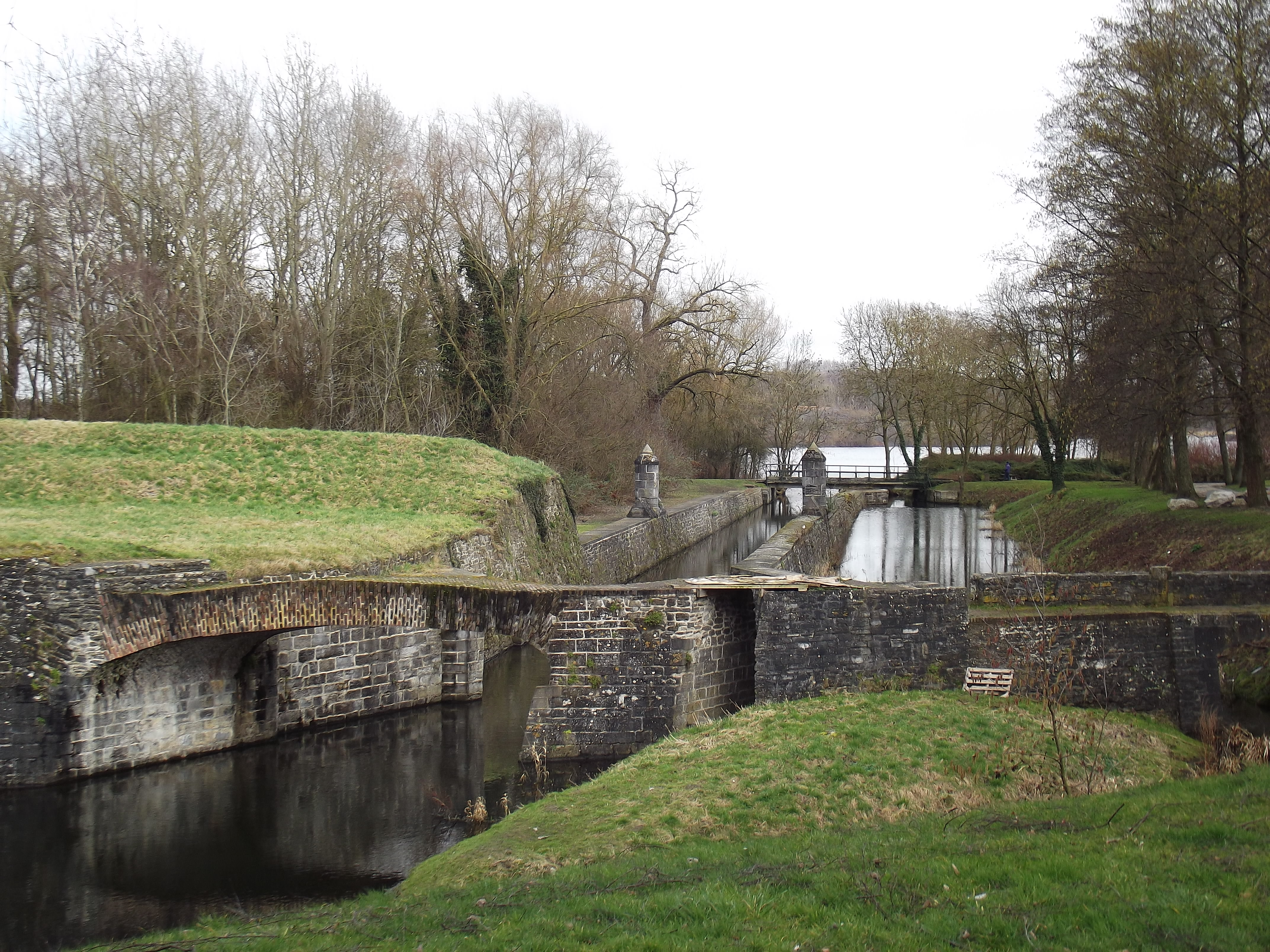 Fortificatiegracht rond Condé-sur-l'Escaut